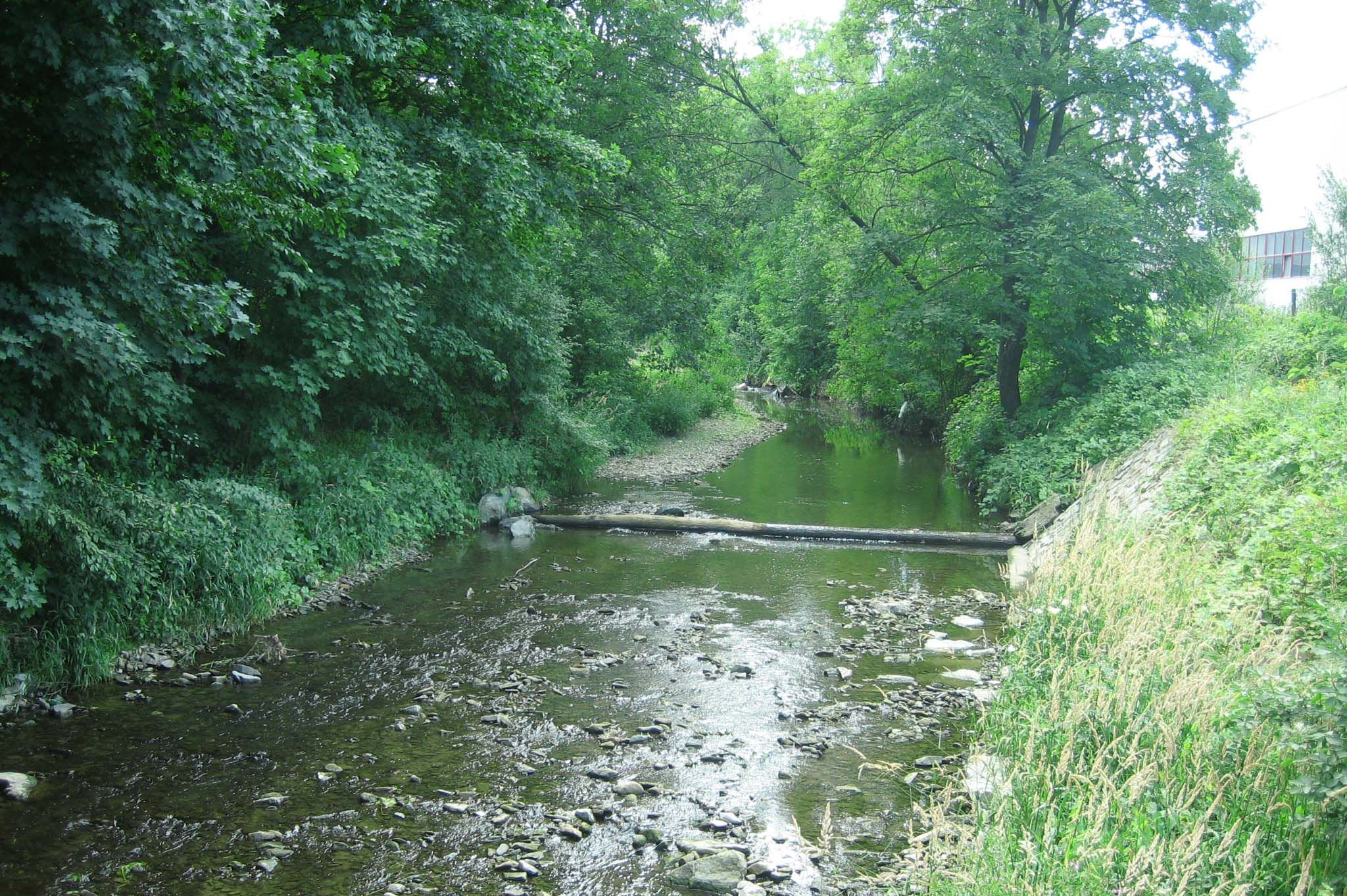 Ratibořka před soutokem se Vsetínskou Bečvou